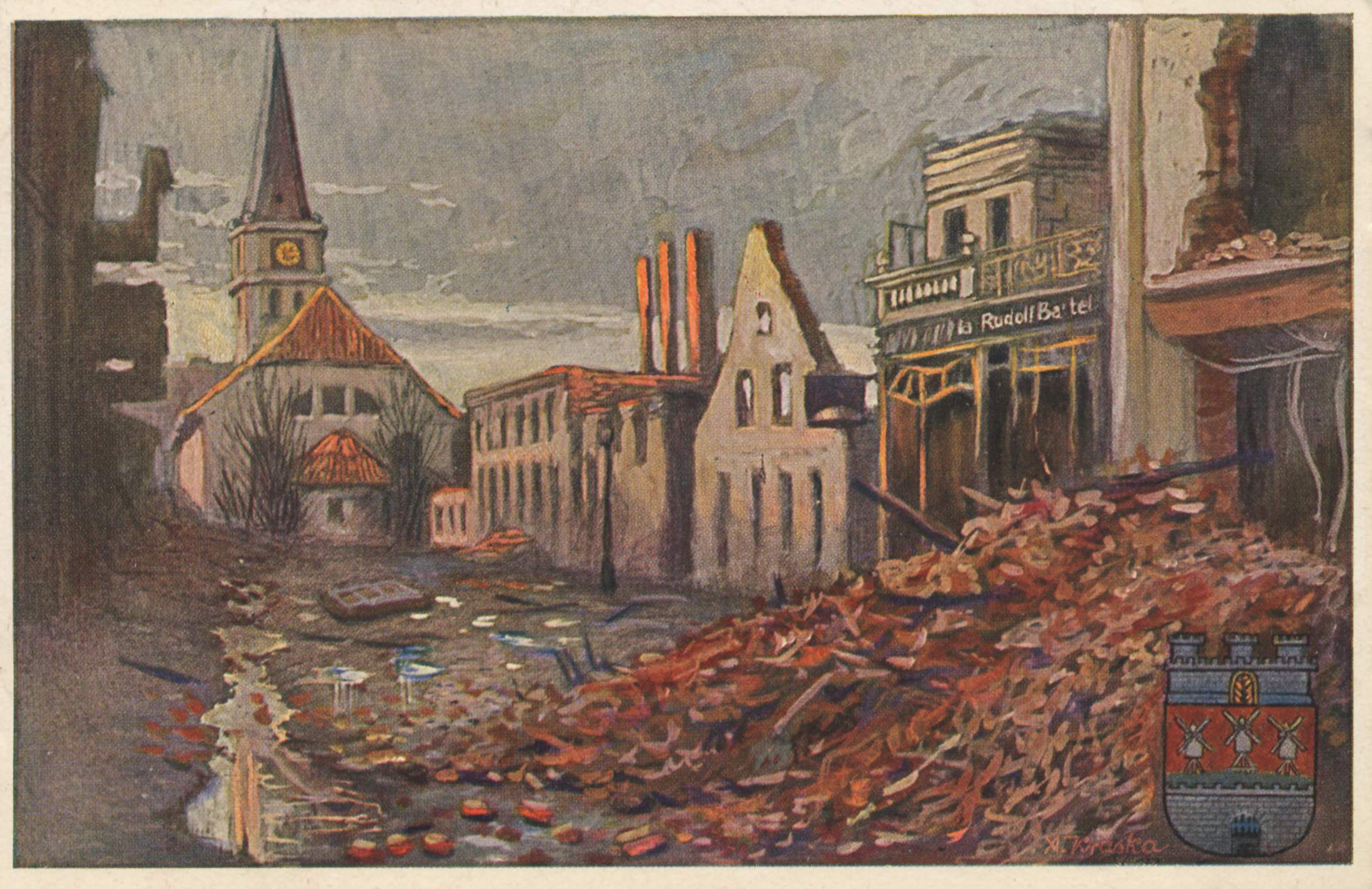 Bahnhofstraße und Kirche